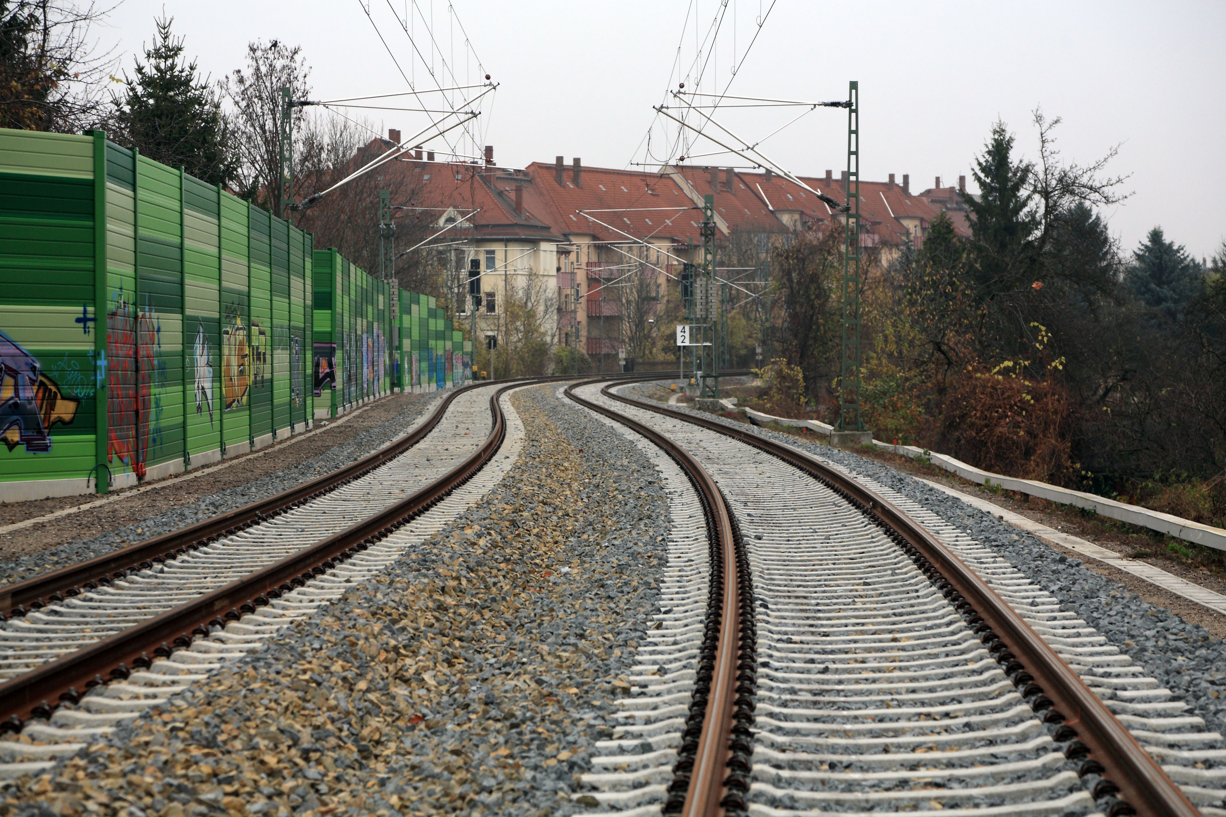 Richtung Abzw Anger, bis auf Höhe der Einfahrsignale A und AA ist der Oberbau neu.